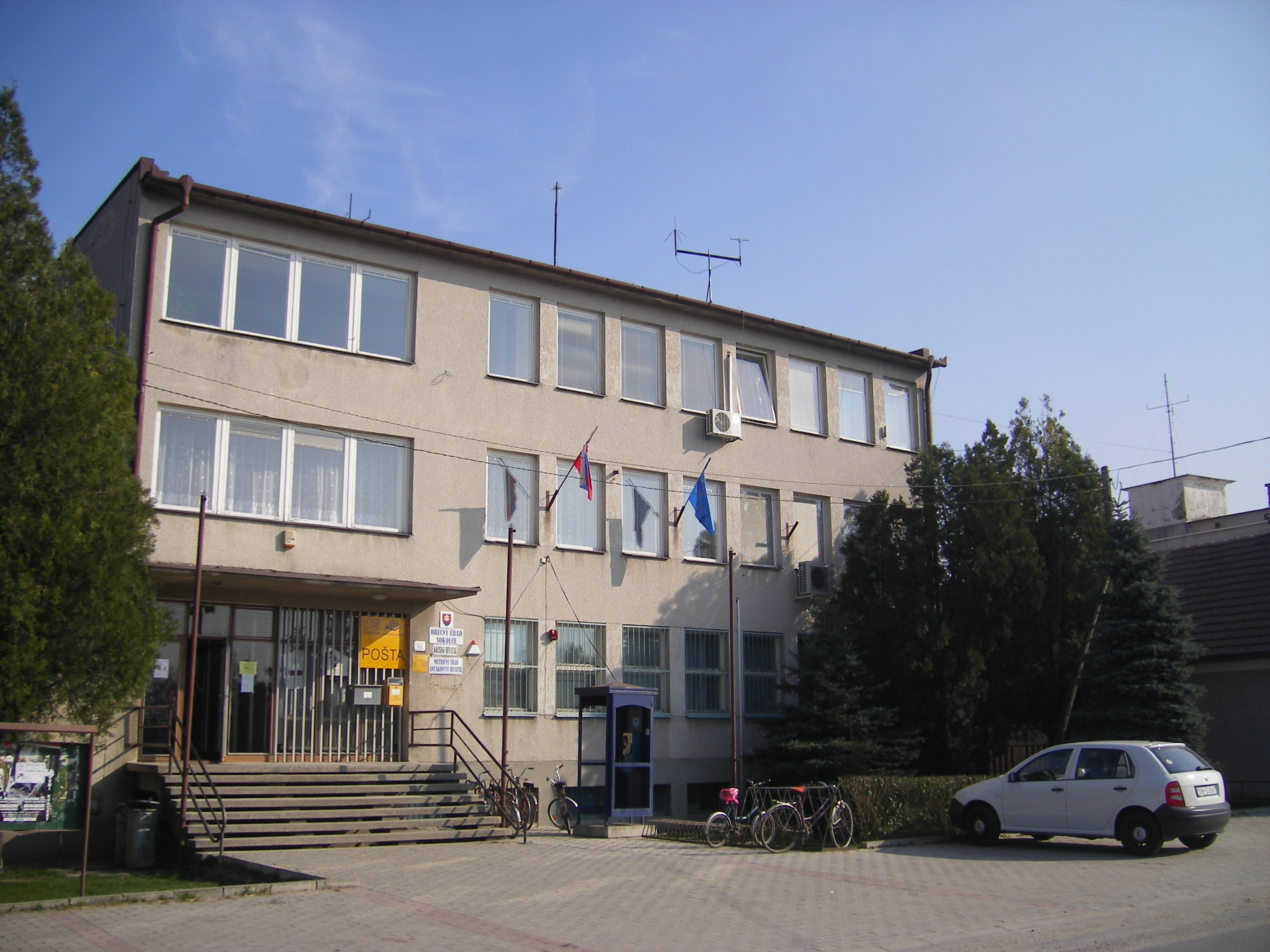 Lakszakállas, községi hivatal